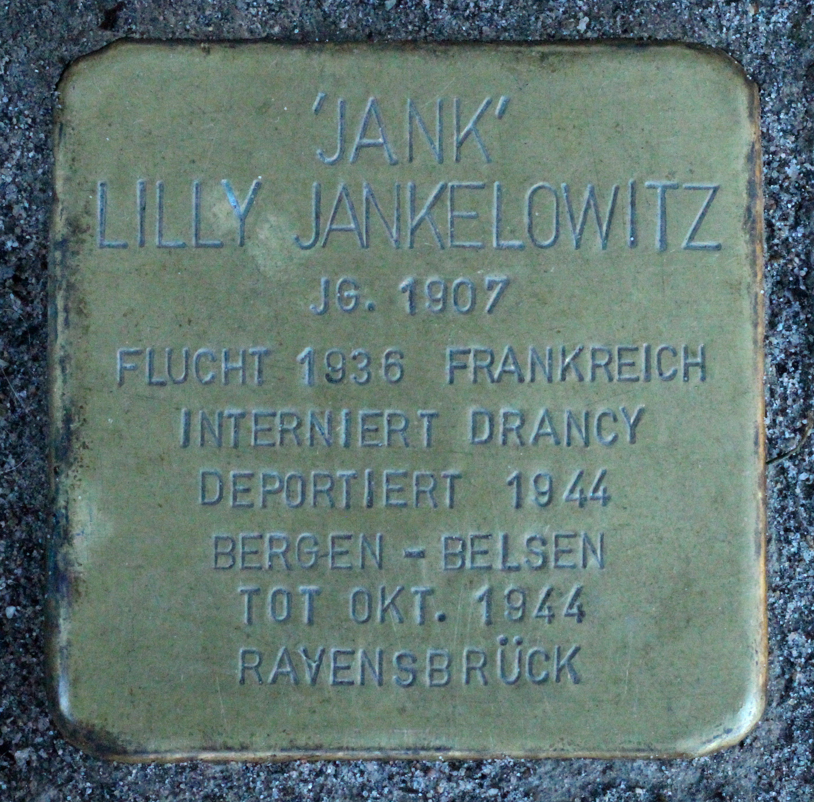 Bildinhalt: Stolperstein Baumeisterstr. 11 Aufnahmeort: Karlsruhe, Deutschland